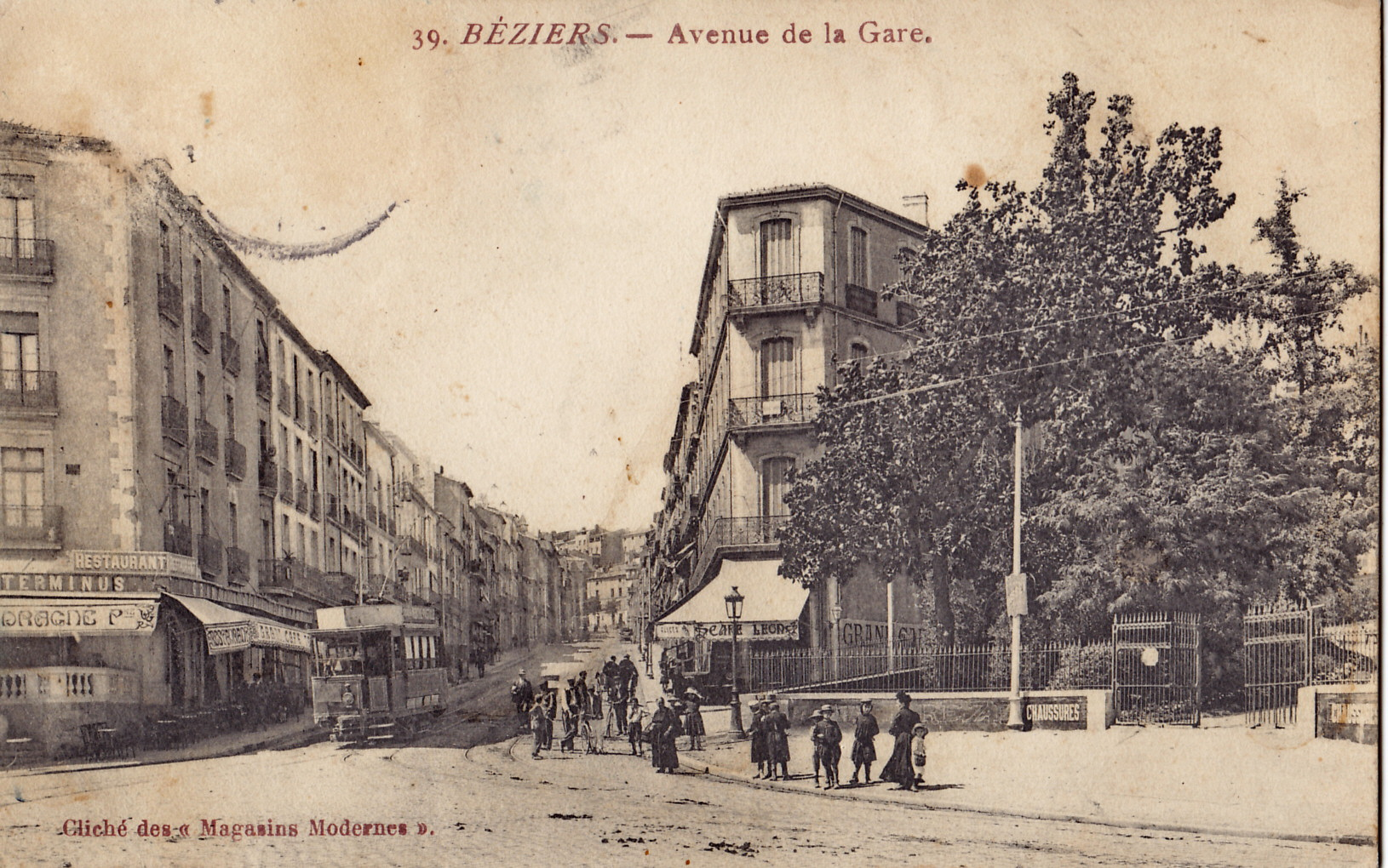 Carte postale ancienne éditée par les Magasins Modernes, n°39 : Béziers - Avenue de la Gare